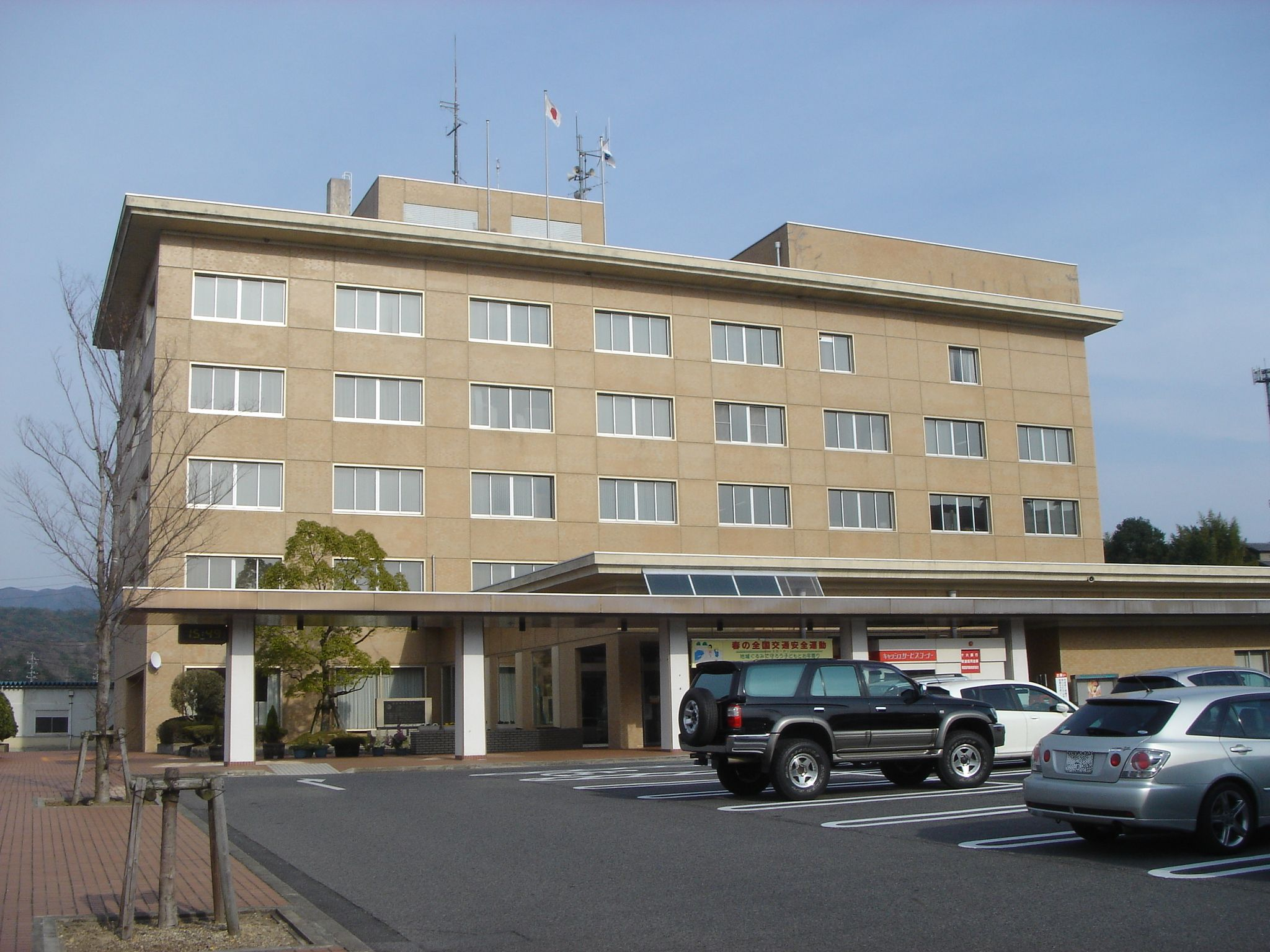 Mizunami city hall(瑞浪市),Mizunami,Gifu,Japan(岐阜県瑞浪市上平町一丁目)で撮影。